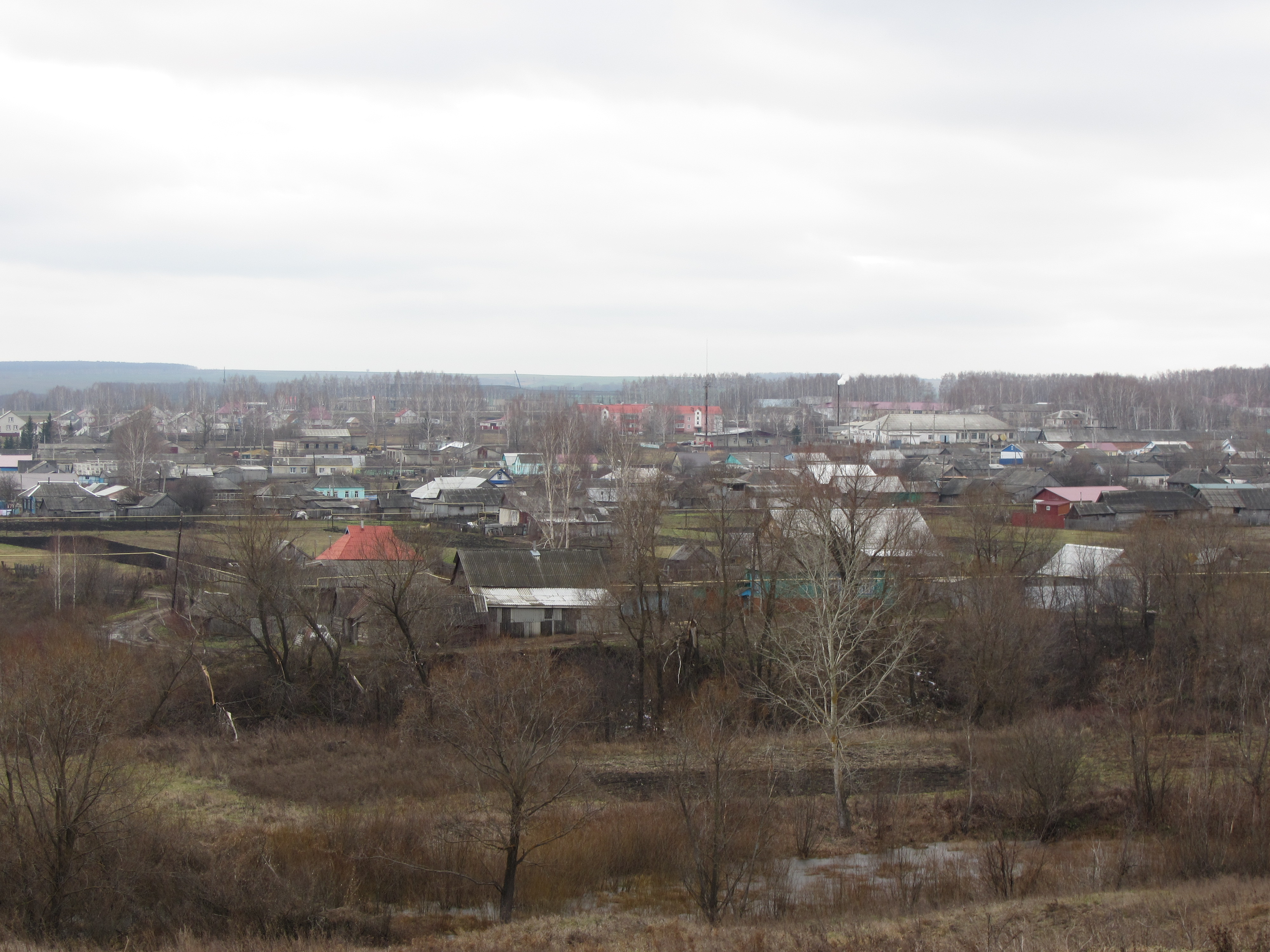 Дубёнки